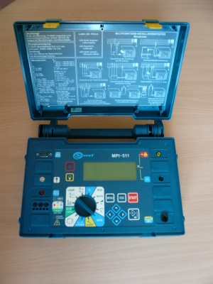 MZC-310S Schleifentester